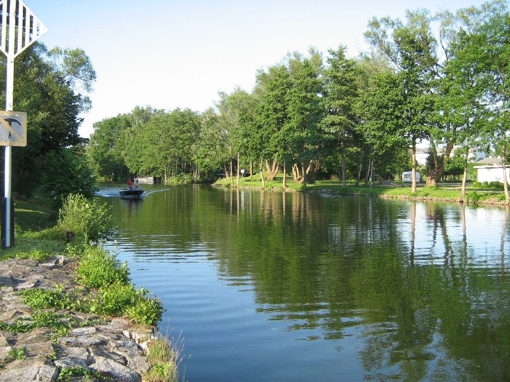 Die Havel bzw. der Wesenberger Kammerkanal bei Priepert in der Mecklenburgische Seenplatte (Landkreis Mecklenburg-Strelitz).